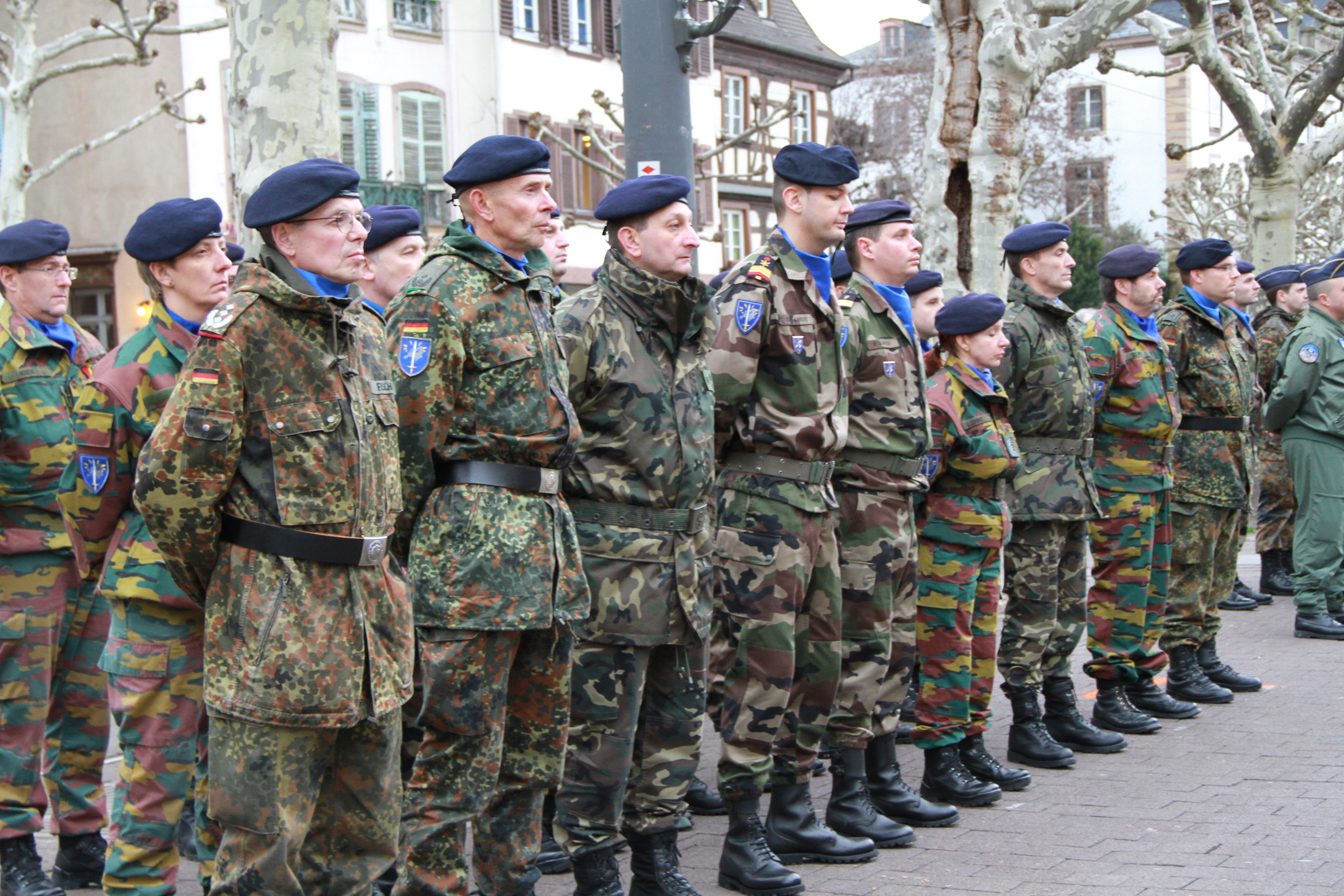 Eurocorps prise d’armes de fin de mission en Afghanistan, place Broglie à Strasbourg 31 janvier 201, en présence de M. Pieter De Crem, ministre belge de la Défense, et de M. Kader Arif, ministre délégué auprès du ministre de la Défense, chargé des Anciens Combattants.